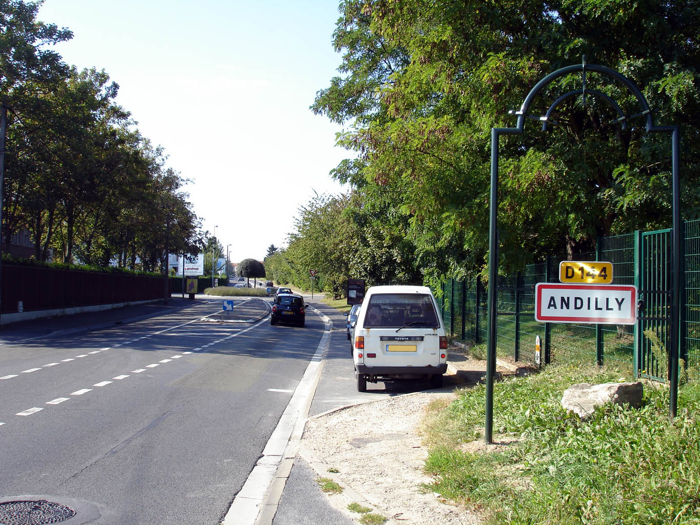 La route de Montmorency à Andilly (Val-d'Oise), France